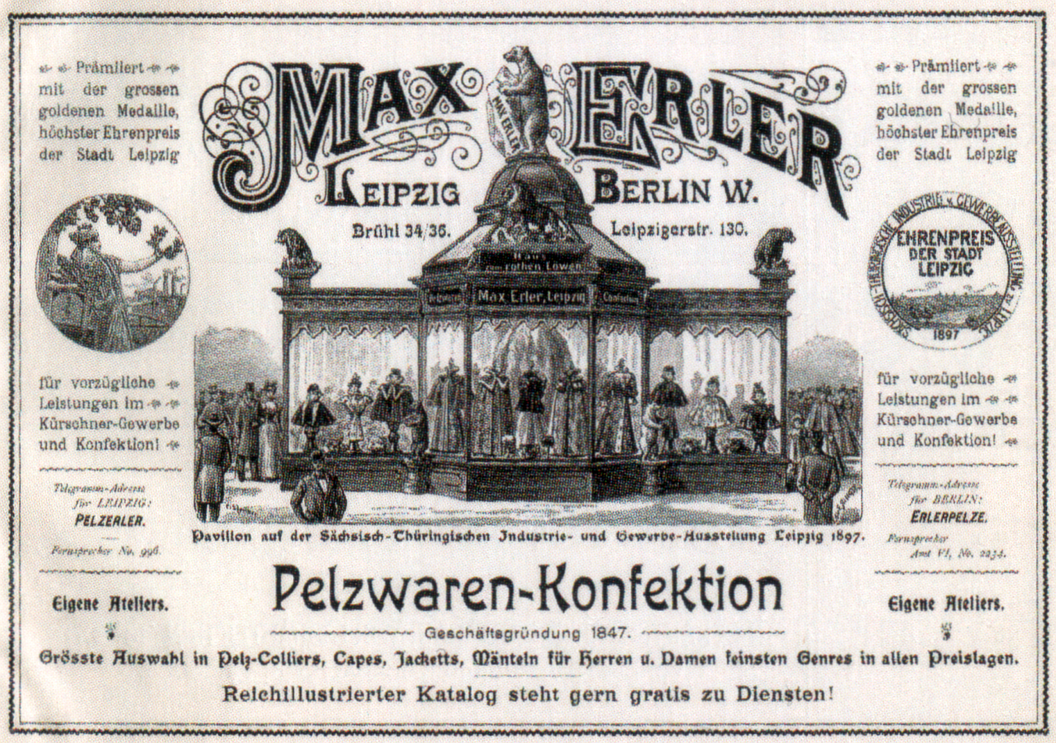 Anzeige der Firma Max Erler, Leipzig und Berlin, Pelzwaren-Konfektion (nach 1897, wohl frühestens 1900). Max Erler, Leipzig, Brühl 34/36. Berlin W., Leipzigerstr. 130. Prämiert mit der grossen goldenen Medaille, höchster Ehrenpreis der Stadt Leipzig für vorzügliche Leistungen im Kürschner-Gewerbe und Konfektion. Telegramm-Adresse für Leipzig. PELZERLER. Telegramm-Adresse für Berlin: ERLERPELZE. Eigene Ateliers. Pelzwaren-Konfektion. Grösste Auswahl in Pelz-Colliers, Capes, Jacketts, Mäntel für Herren u. Damen feinsten Genres in allen Preislagen. Reichillustrierter Katalog steht gern gratis zu Diensten! Abbildung: Pavillon auf der Sächsisch-Thüringischen Industrie- und Gewerbe-Ausstellung Leipzig 1897 („Haus zum rothen Löwen“)